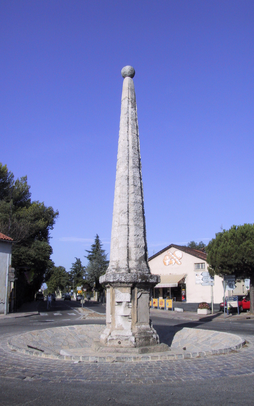 La Pyramide de Saint-Christol-lès-Alès. Ce monument est un obélisque érigé en 1777.